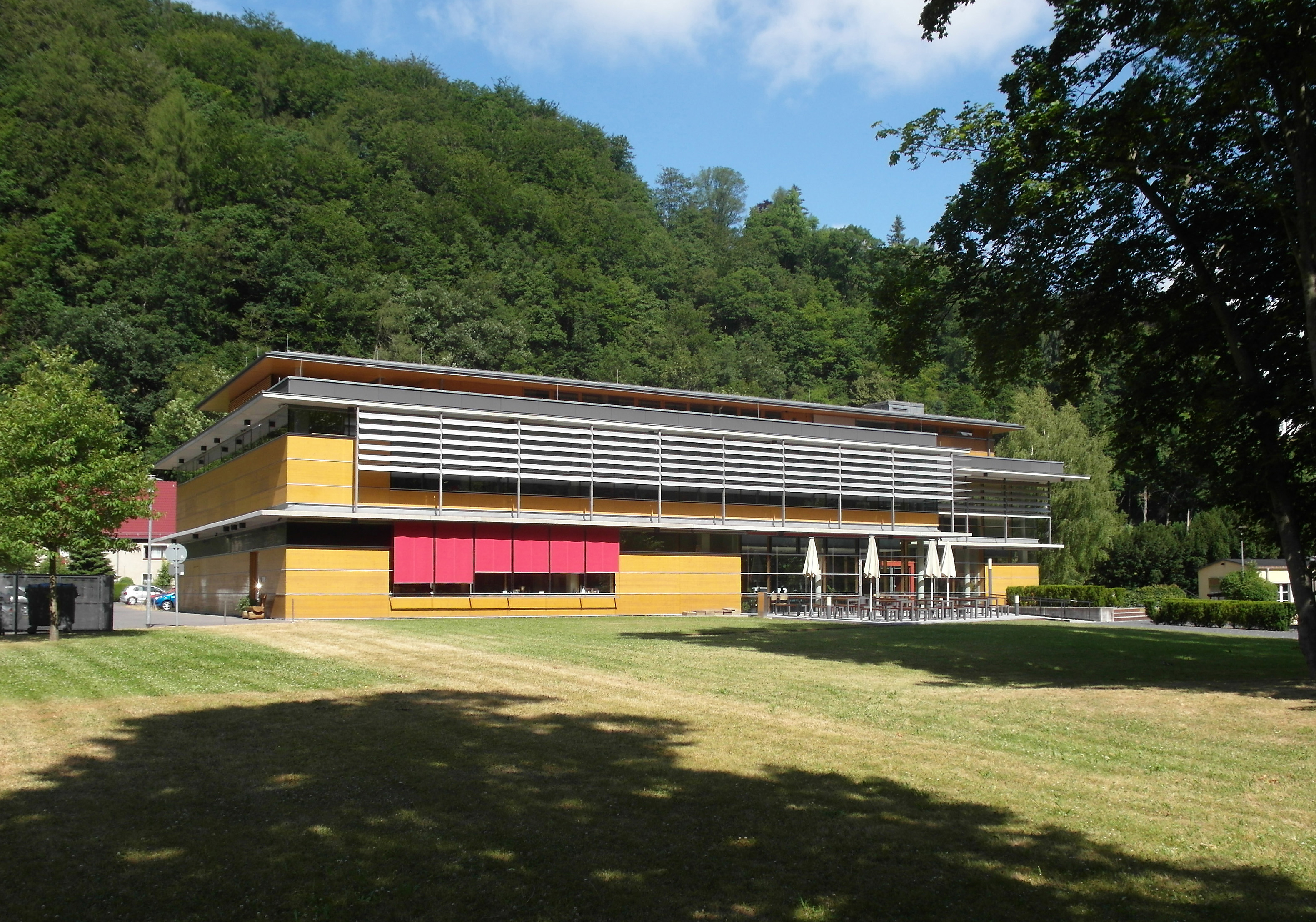 24.06.2014 01737 Tharandt, Pienner Str. 15 (GMP: 50.980584,13.581269): Forstliche Hochschule, Rossmässler-Bau mit Mensa, Bibliothek und Studentenwerk. Teil der TU Dresden. [SAM4816.JPG]20140624135DR.JPG(c)Blobelt